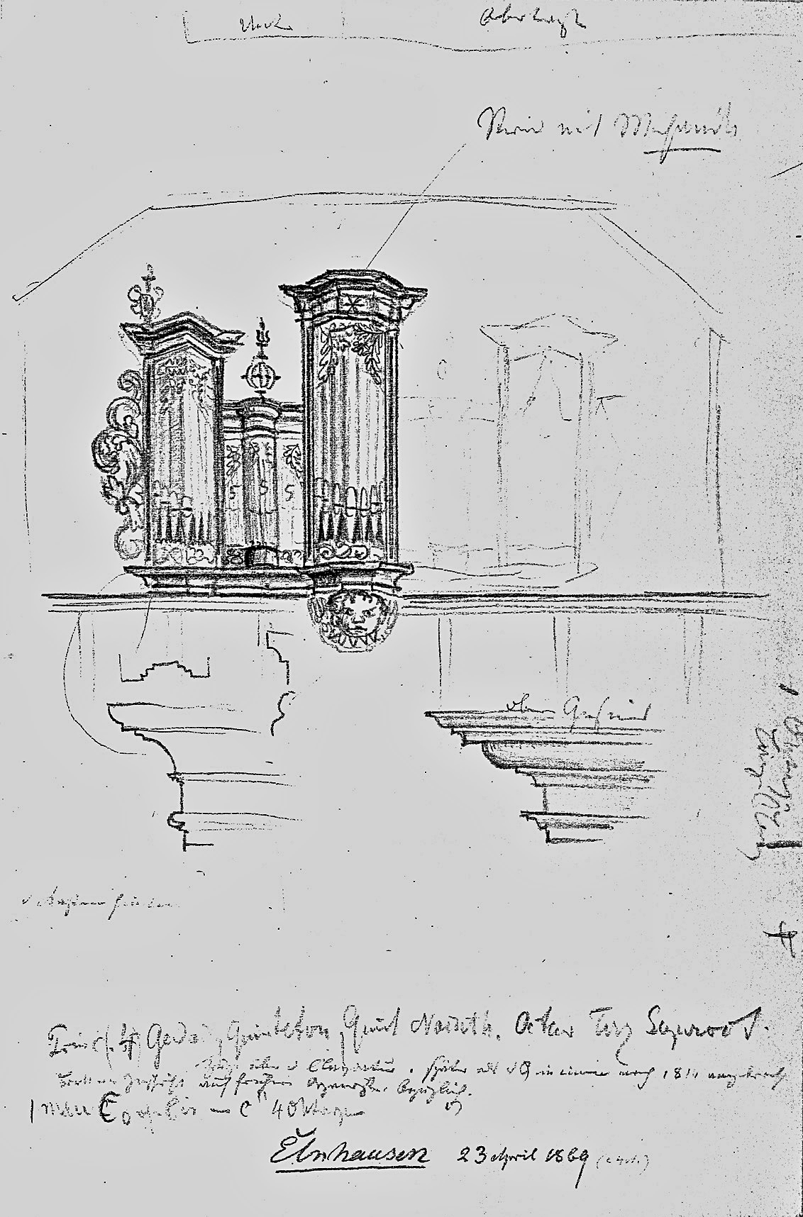 Drawing Ludwig Bickell: Organ in Elnhausen, District Marburg-Biedenkopf, Hesse, Germany